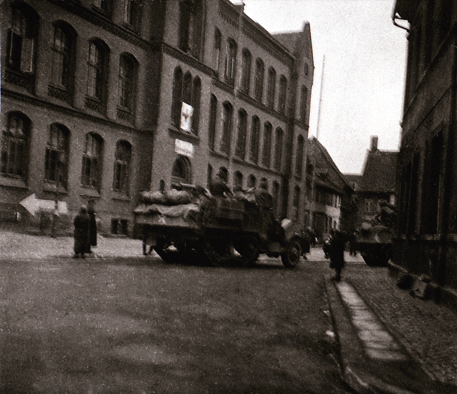 Die ersten amerikanischen Panzerfahrzeuge am 12. April 1945, mittags, in Helmstedt: Langer Steinweg. Im Hintergrund das Lyzeum, zum Lazarett umgebaut (Lazarettfahne sichtbar). Ganz rechts die Mauer des Hauses Stobenstrasse 18, des Wohnhauses von Kramers Gut. Fotograf: Dr. Helmut Kramer, geb. 30.03.1930 Kamera: Rolleiflex Standard Alt Model 622 Seriennummer 373519 Baujahr 1935. Vgl. Hans-Erhard Mueller, Helmstedt unterm Hakenkreuz, Helmstedt 1995